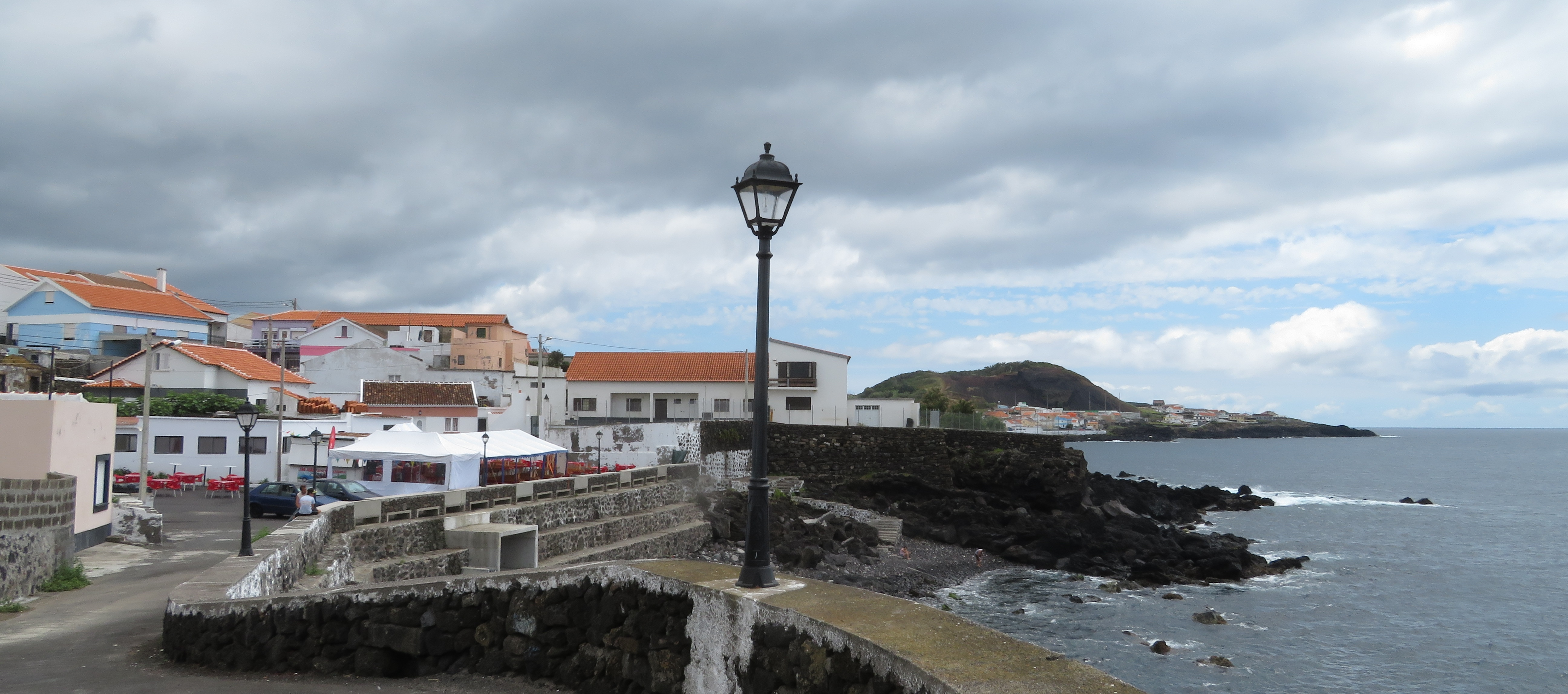 Miradouro Maria Augusta de Castro, Poço d'Além, Porto Judeu, ilha Terceira, Acores, Portugal